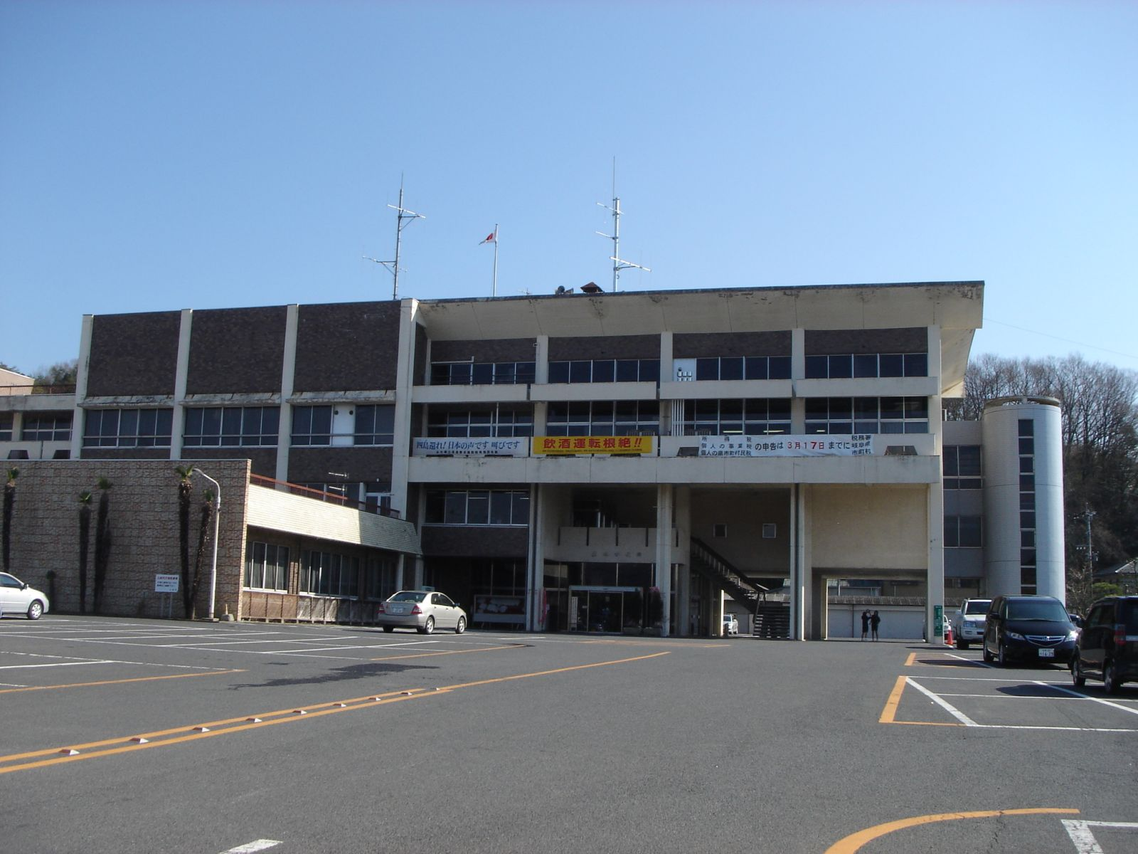 Toki City hall（土岐市市役所）,Toki,Gifu,Japan(岐阜県土岐市土岐津町土岐口)で撮影。